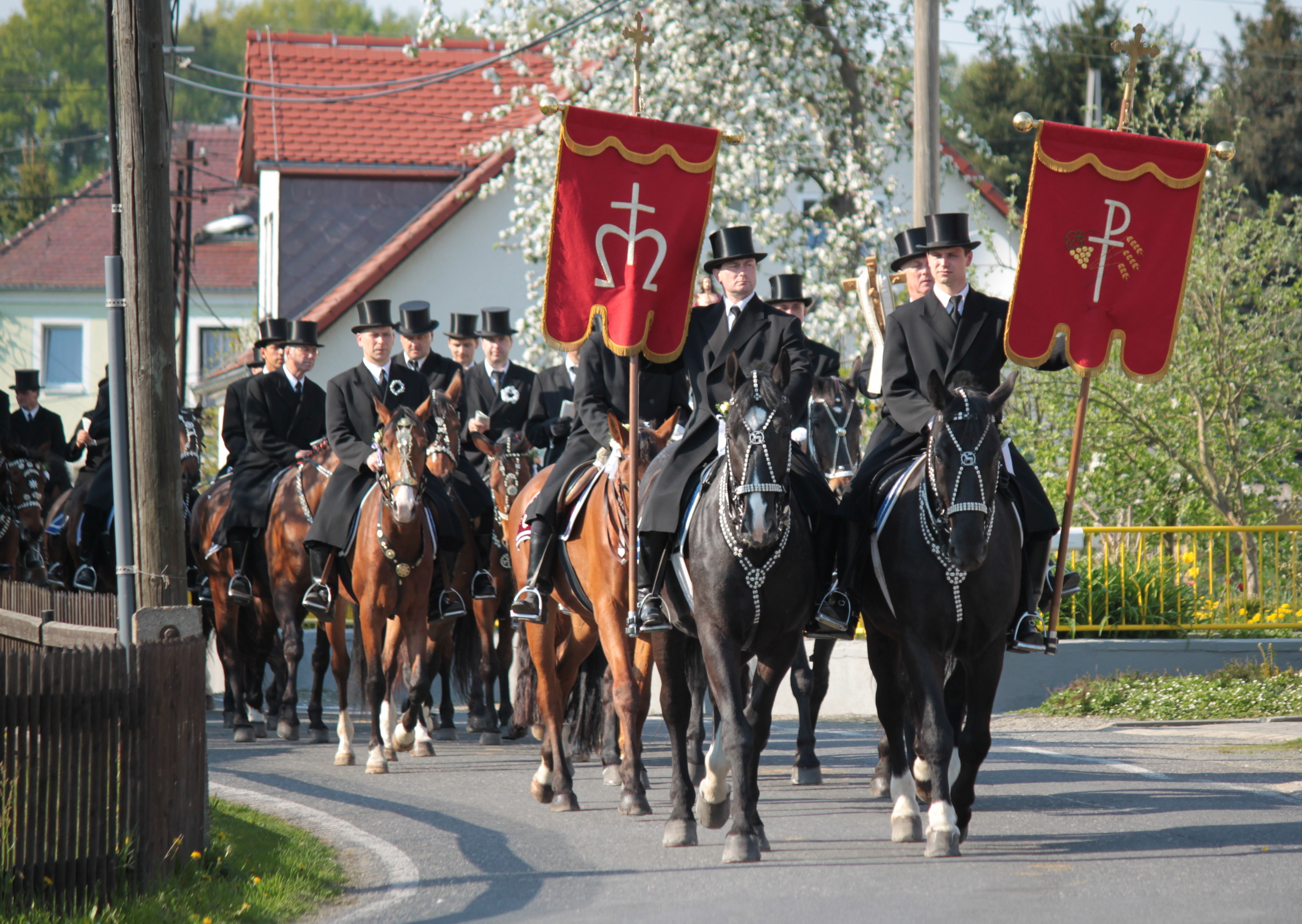 Ostroer Osterreiter in Miltitz, Landkreis Bautzen, Sachsen. Hornjoserbsce: Wotrowscy křižerjo w Miłoćicach.